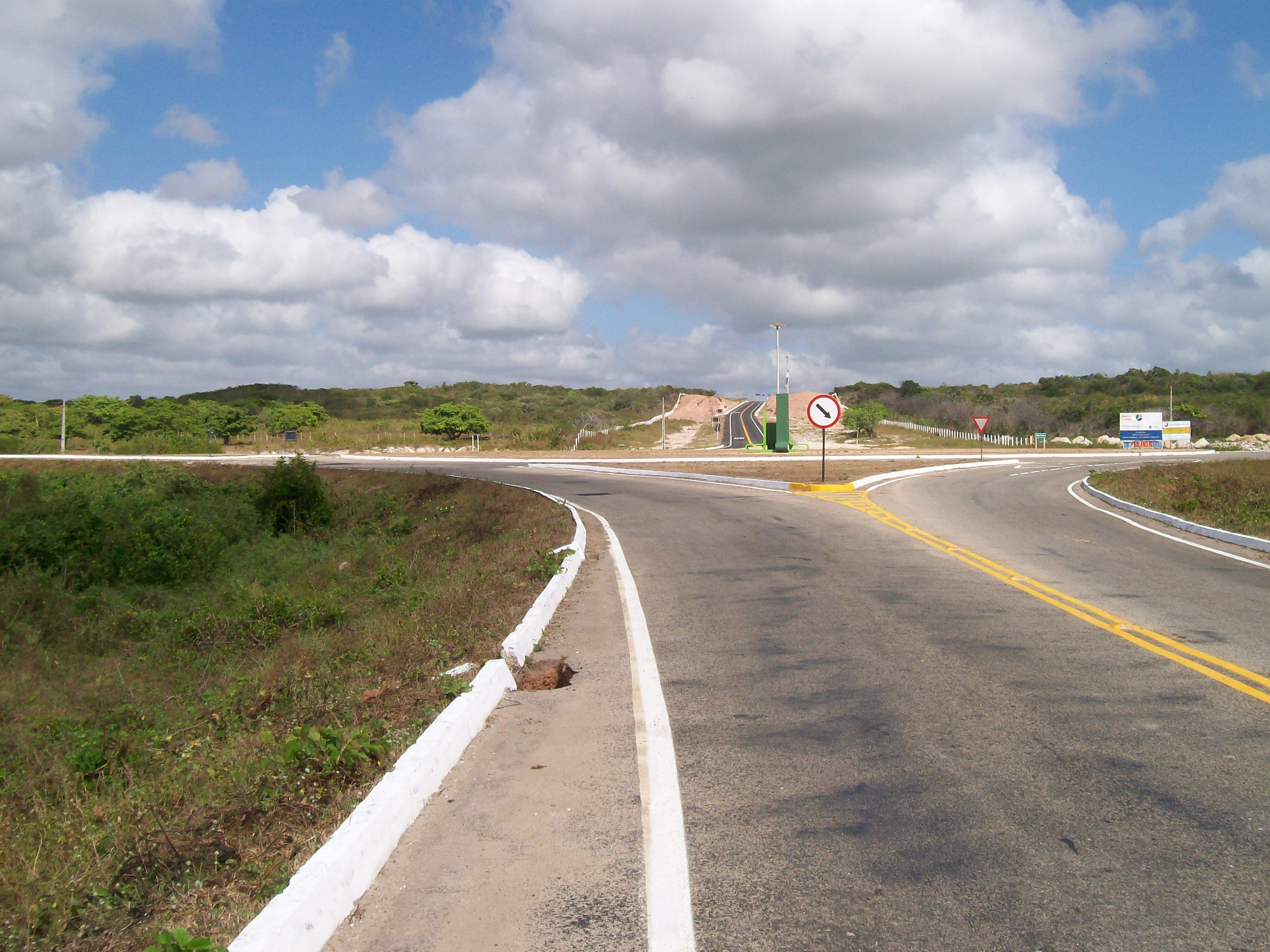 Nova Estrada para Jericoacoara